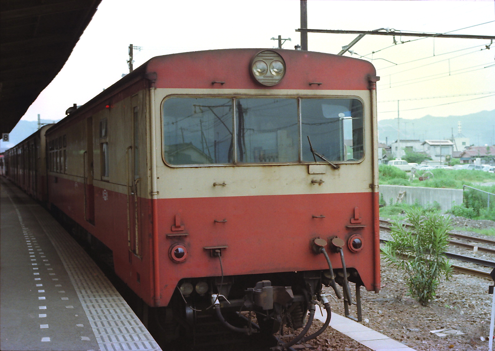 和歌山駅 キハユニ15 和歌山線